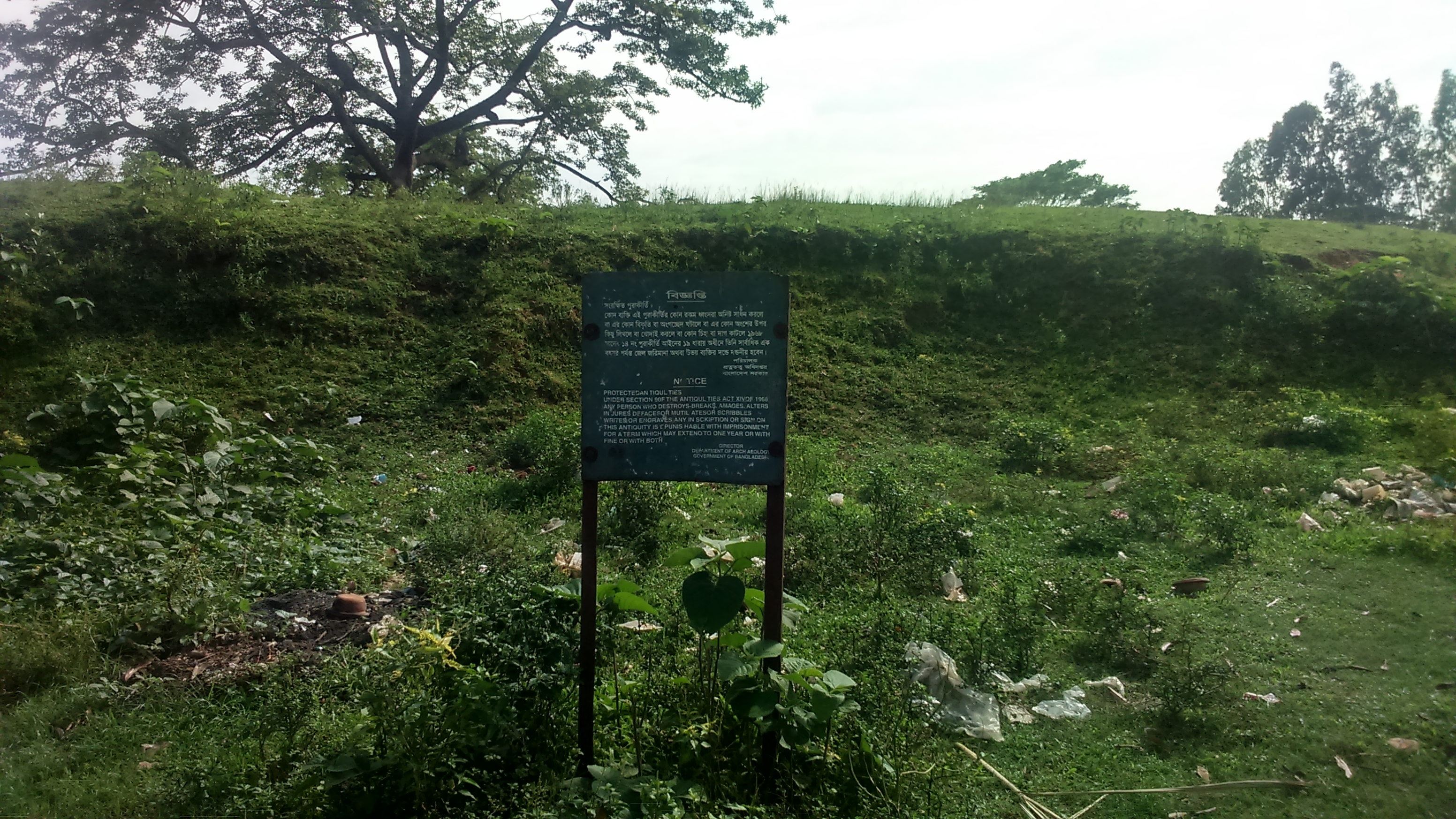 শালিবাহন রাজার বাড়ি